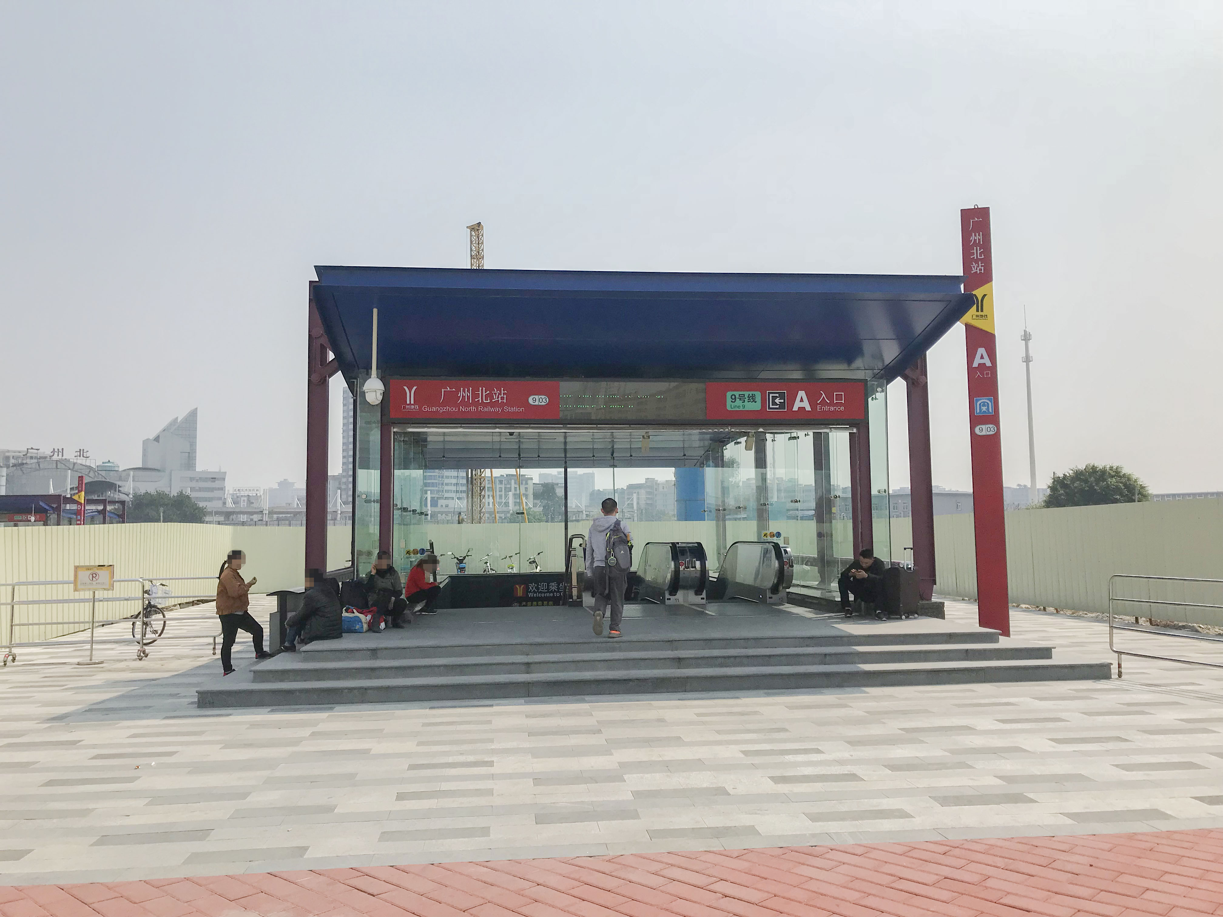 广州地铁广州北站